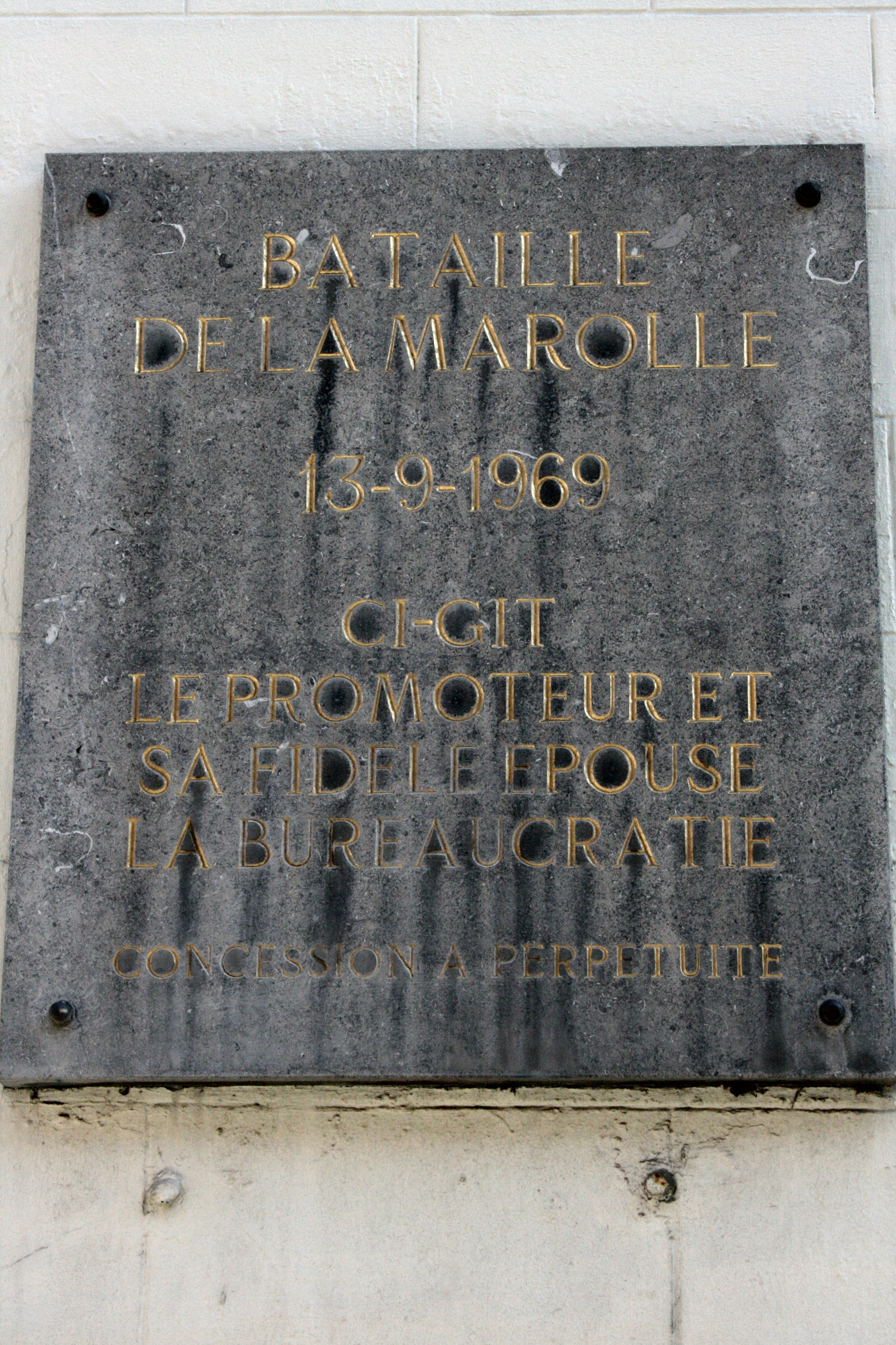 Rue de Montserrat, Bruxelles, Belgique. Plaque commémorative de la Bataille des Marolles : face à l'oppostion des habitants du quartier à un plan d'extension du palais de Justice, les autorités finirent par y renoncer